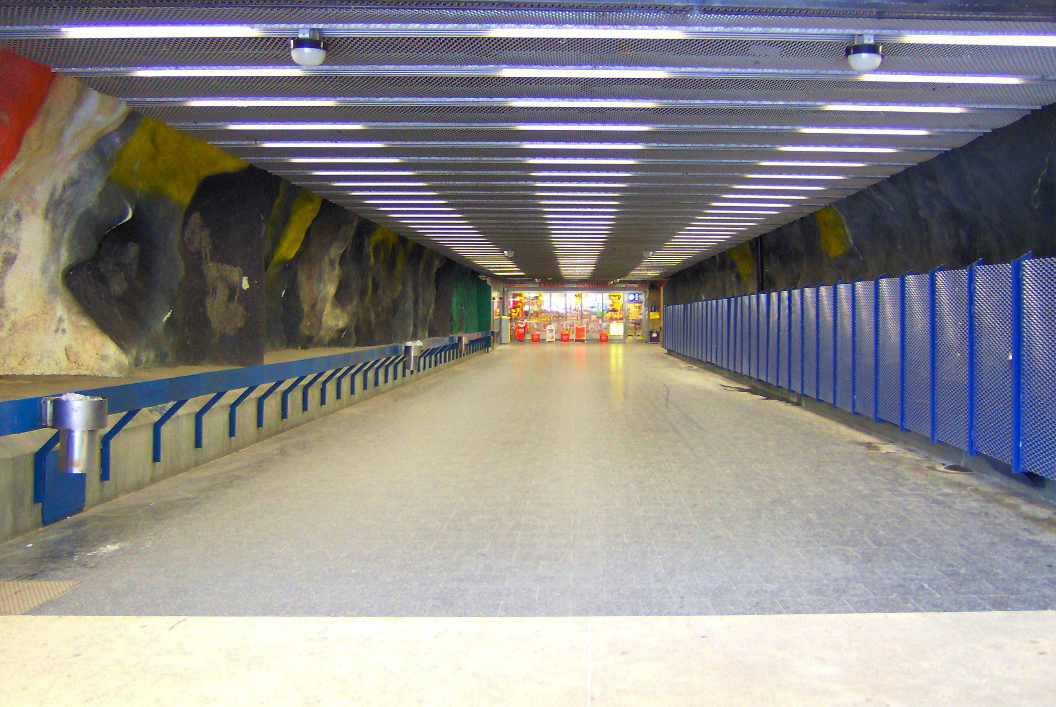 Den långa sluttande gången i berget till Masmo tunnelbanestation. Kirundi: The long sloping walkway below the mountain to the Masmo Subway station. Masmo is a suburb southwest of Central Stockholm developed in the late 1970's.